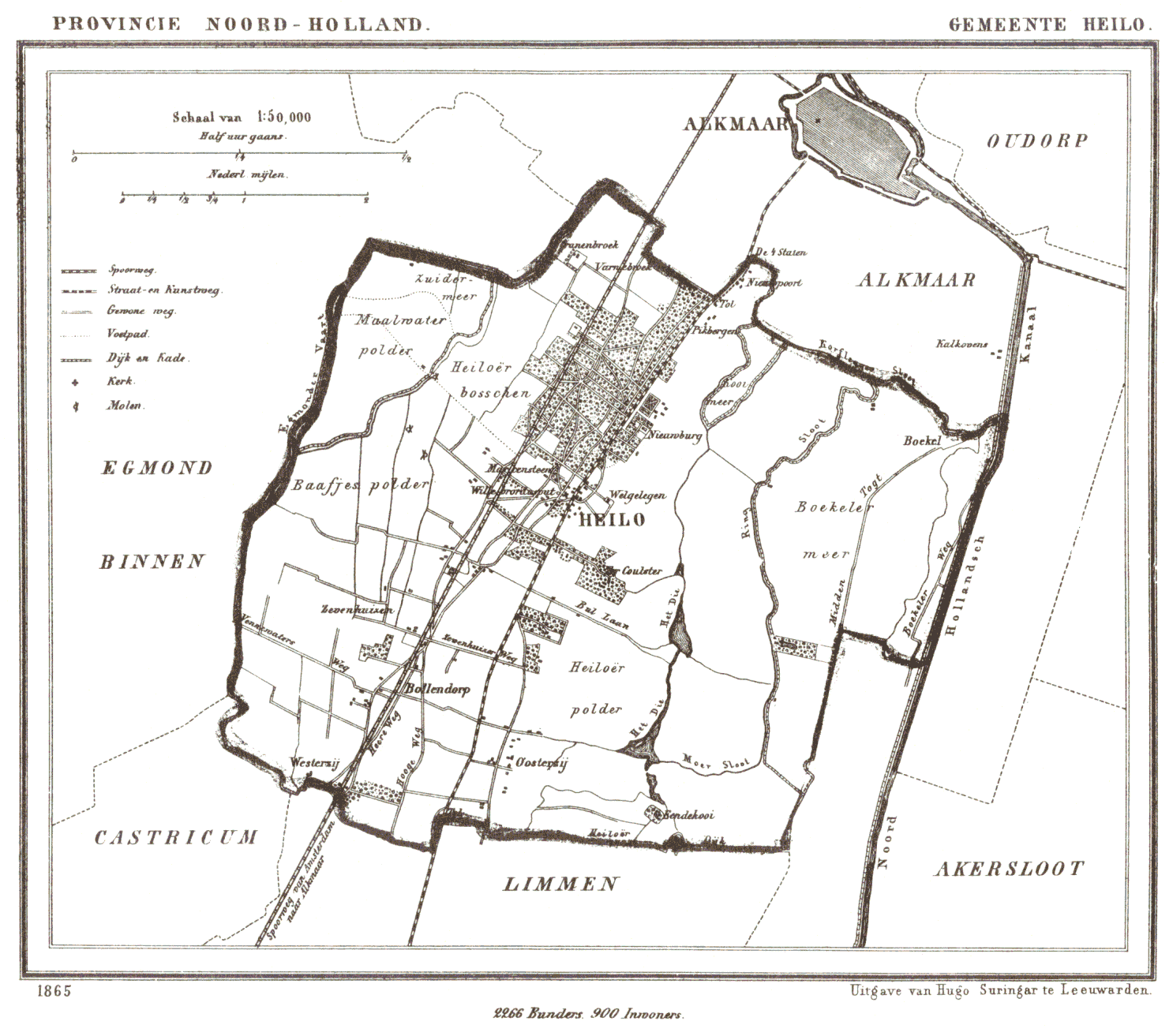 Kaart van Heiloo uit Gemeente Atlas van Nederland, J. Kuyper 1865-1870, Uitgave Hugo Suringar Leeuwarden.